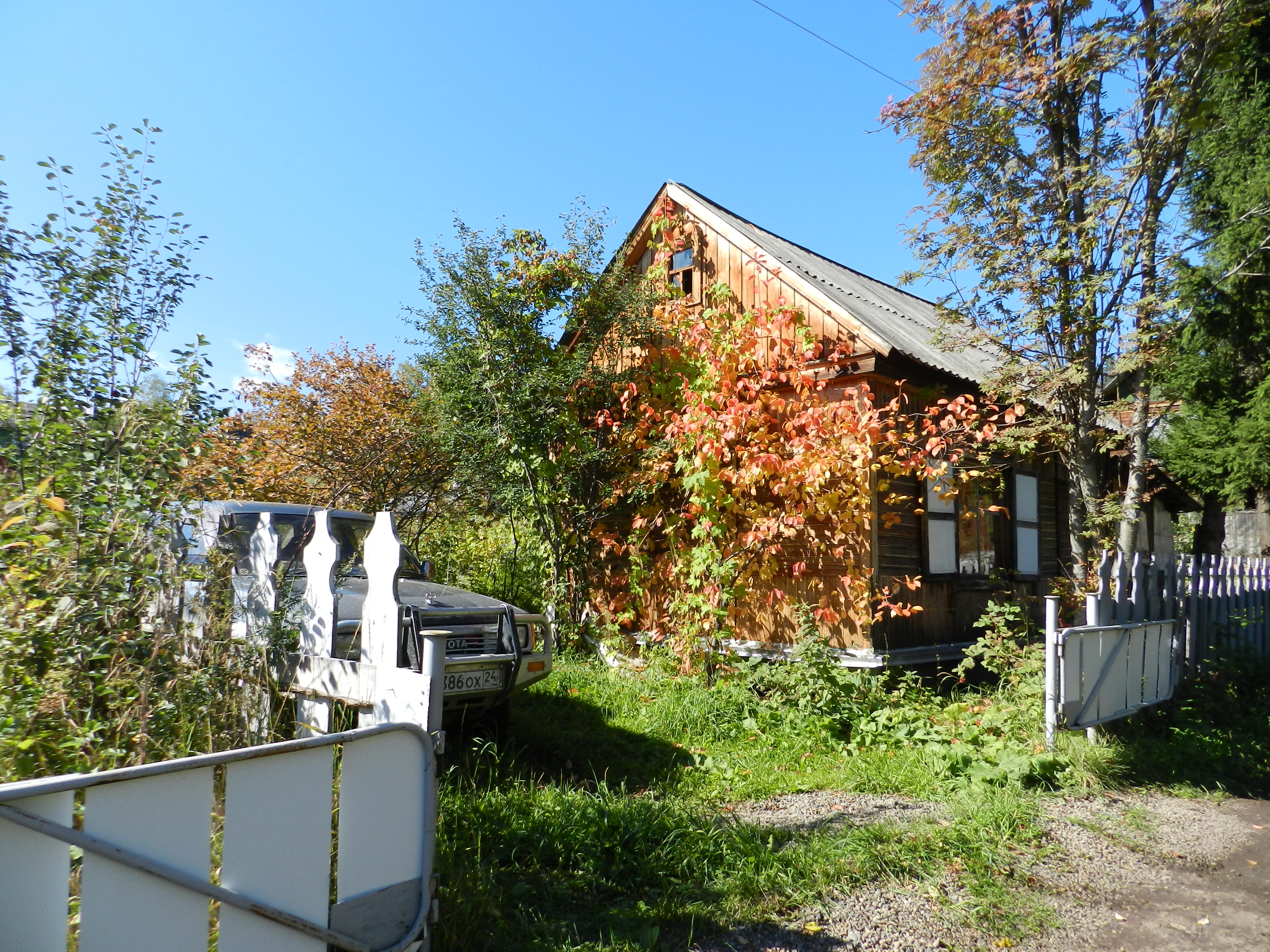 Mansky District, Krasnoyarsk Krai, Russia